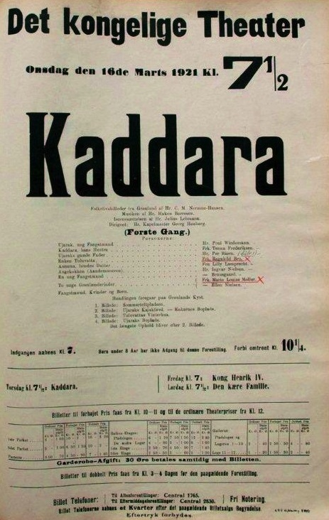 Plakat fra Det Kongelige Teater for operaen Kaddara med uropførsel d. 16. marts 1921